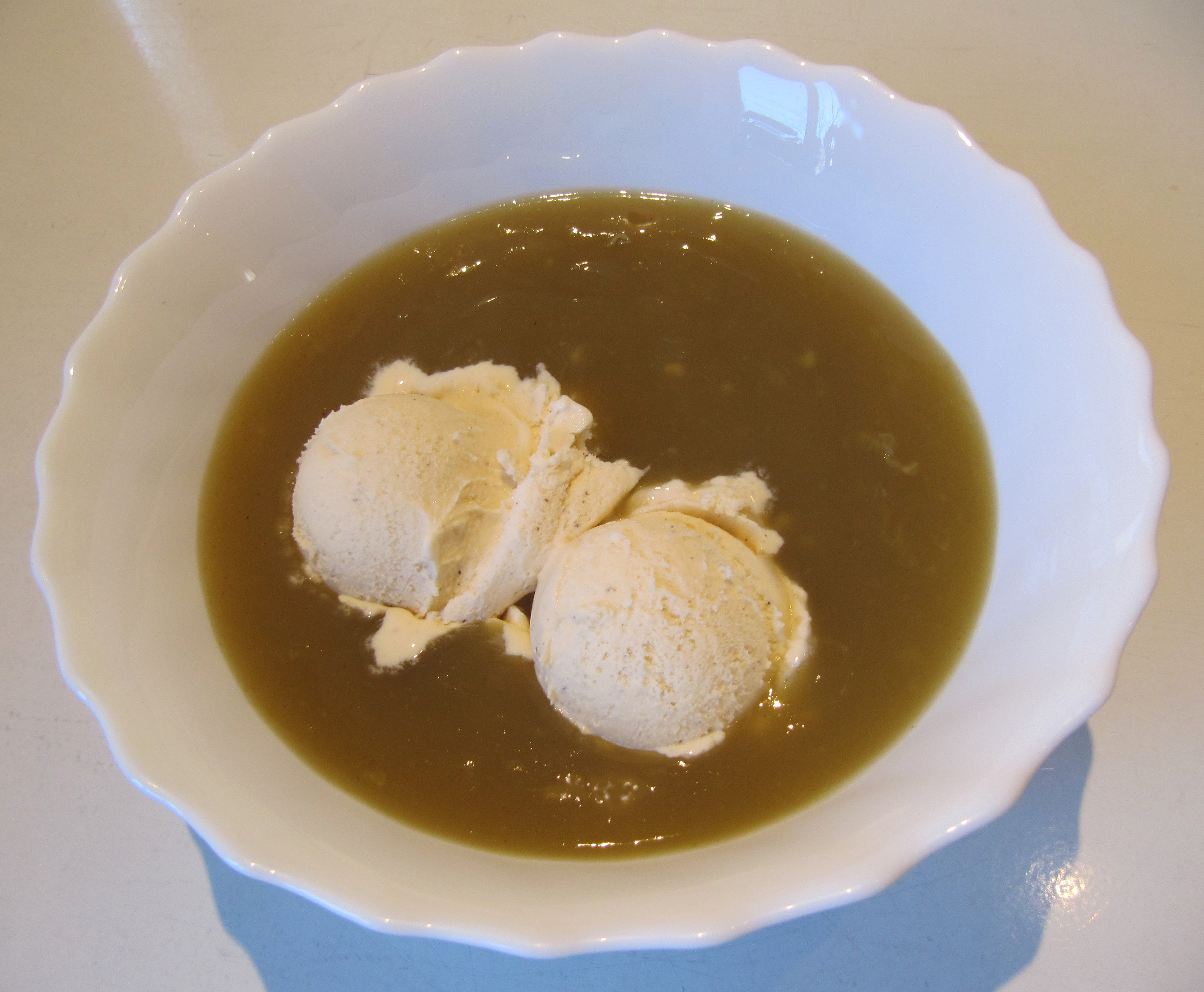 Grüne Grütze mit Vanilleeis (Fertigprodukt von Scandic Food A/S, DK-7100 Vejle, März 2016)